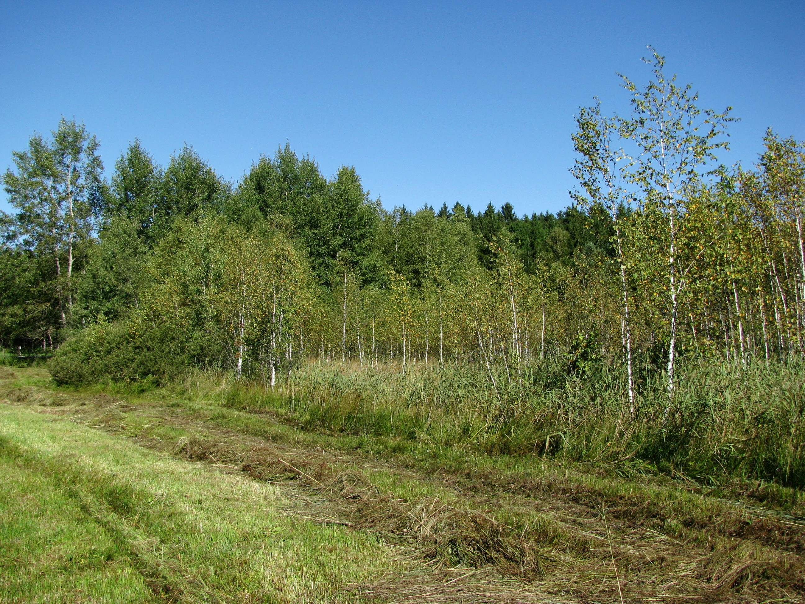 Leonhardsfilz, südwestlicher Randbereich